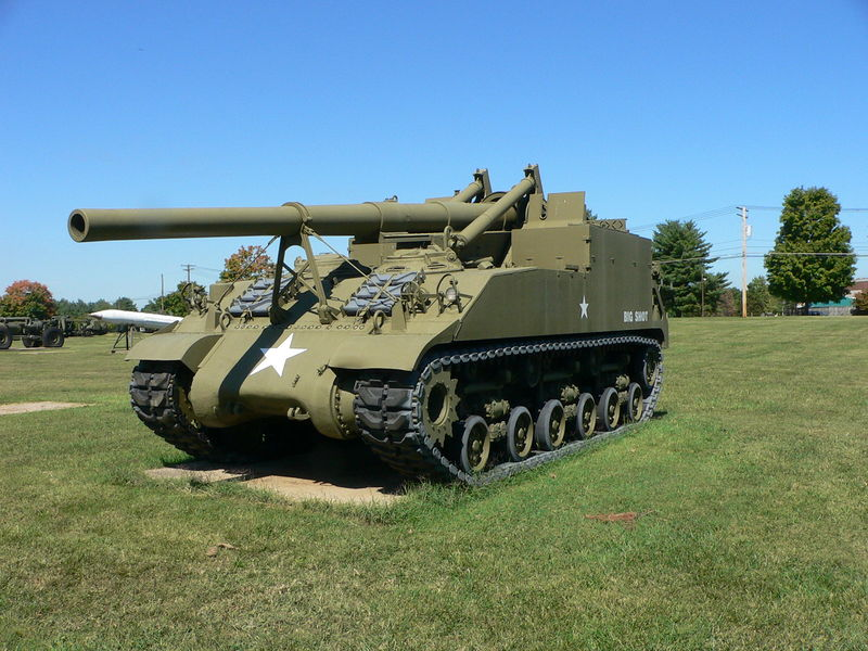 M40 v United States Army Ordnance Museum